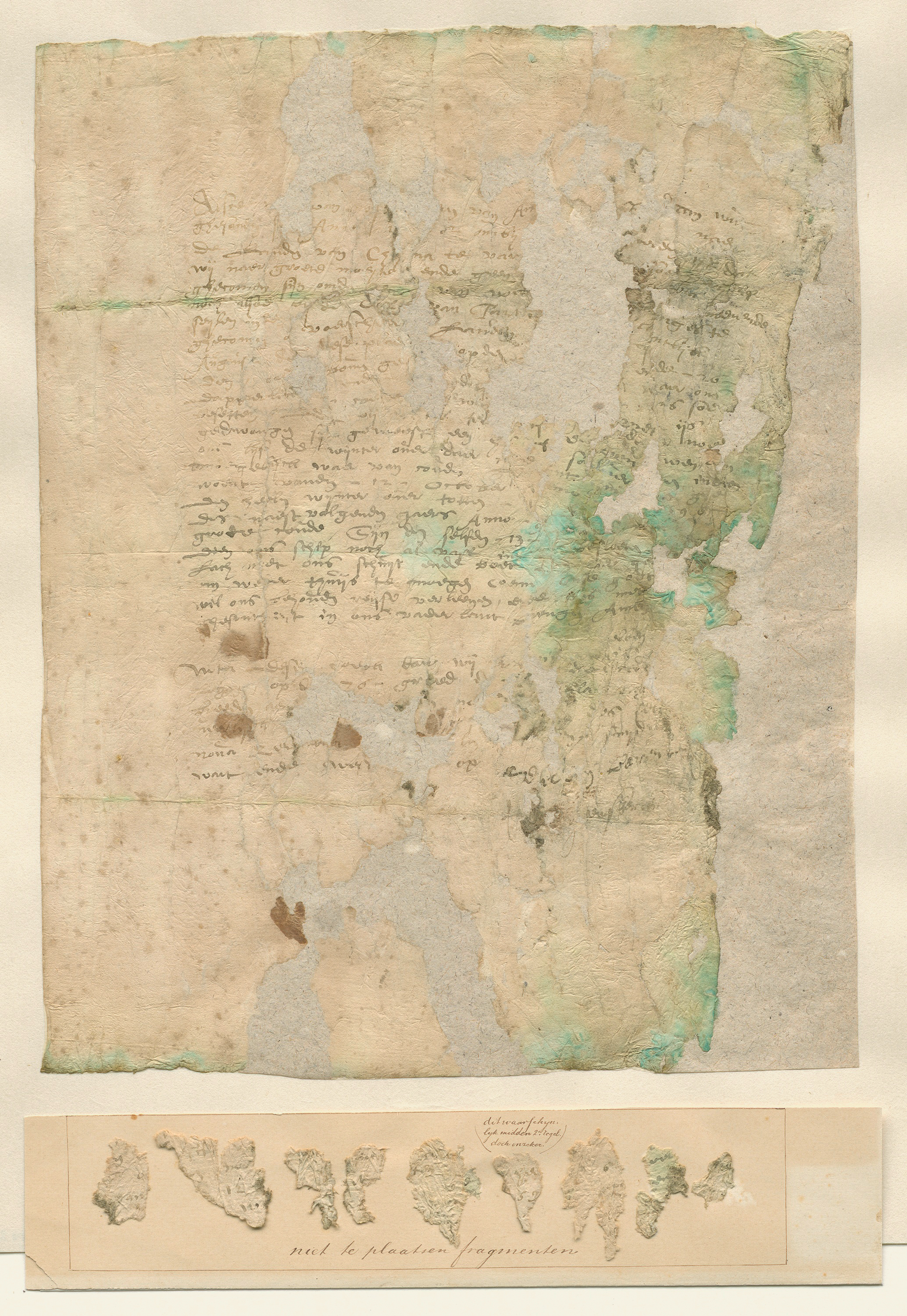 Verantwoording betreffende de gang van zaken van de derde Nederlandse doorvaartpoging en afscheidsdocument geschreven door Barents en Heemskerck: Alsoe (wy) van Borgemeestern van Am(ster)dam waren (?) ghesonden ... An...1(59)... om by (N)oerden naer de landen van Chijna te var(en)...soe est d(at) wij naer groete moeyte ende geen (cleenen) perijckel... ghecomen sijn om de West van Nov(a) (Zembla) meenende noch alsoe bij de cost van Tartrie(n)...ig...es te seylen naer voerschreven landen...la...ntlijck ghecommen op deze plaet(s)...op den...de 26 Augus...boven gen...waer ons den...ende...ns soe (?) dapperlick...gecom...ine...ijs... besetten...ende wij...desen noe(t) gedwongen sijn geweest een h(uy)s (te) bouwen om ons lijff de wynter over daeri(nn)e (te) salveren indien tmoegelijck waer van coude(?)...int huys ghe- woent van den - 12 - October anno - 1596 - den heelen wynter over totten - 13... des naestvolgenden jaers anno - 97 -... groete coude. Syn denselfden 13 (Jun)y... doen ons schip noch al vast in (t'ijs) besloeten lach met ons schuyt ende boet van hier ge(zeilt) om weder thuys te moegen coemen, Onse Godt wil ons behouen reyse verleenen, ende ons met gesontheyt in ons vaderlant brengen, Amen. NOTA, dezen hoeck daer wij waren... laeg...op den 76 graed d... breeden... veerlijk... Nova zen...b.a...suydel wint ende west...op. Wyl.em barents Ja...Heemskerck (transcriptie uit L'Honoré Naber, S. P. (1917) Reizen van Willem Barents, Jacob van Heemskerck, Jan Cornelisz. Rijp en anderen naar het Noorden 1594-1597. Deel II. Den Haag: Martinus Nijhoff)